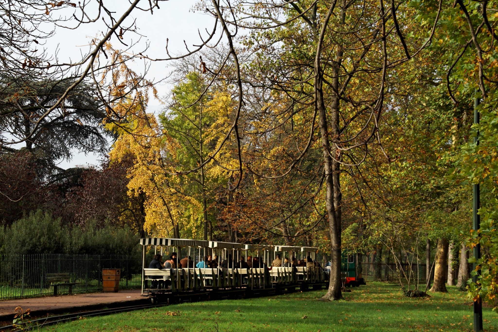 Le petit train du jardin d'acclimatation à Neuilly